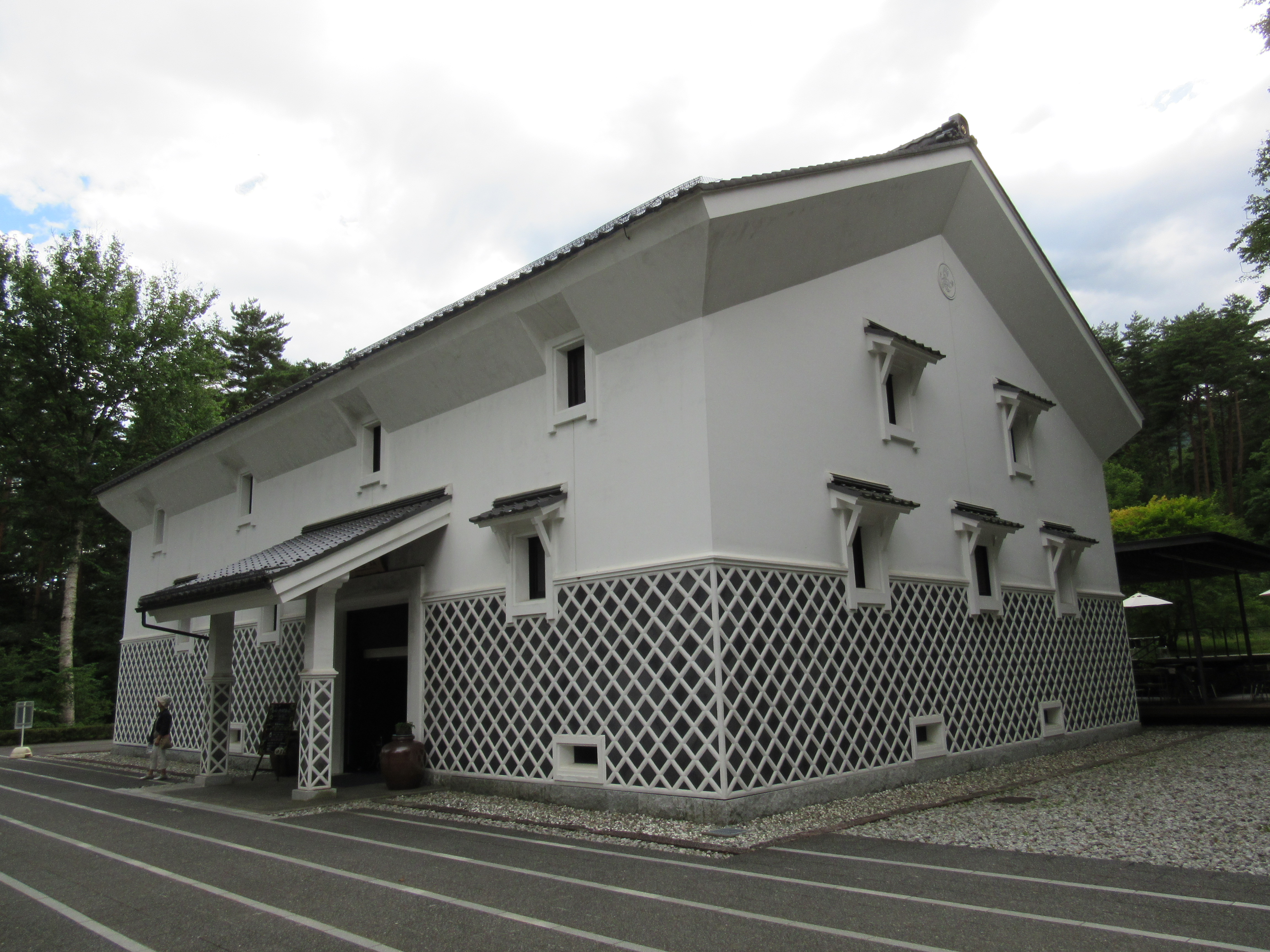 養命酒製造駒ケ根工場内 記念館